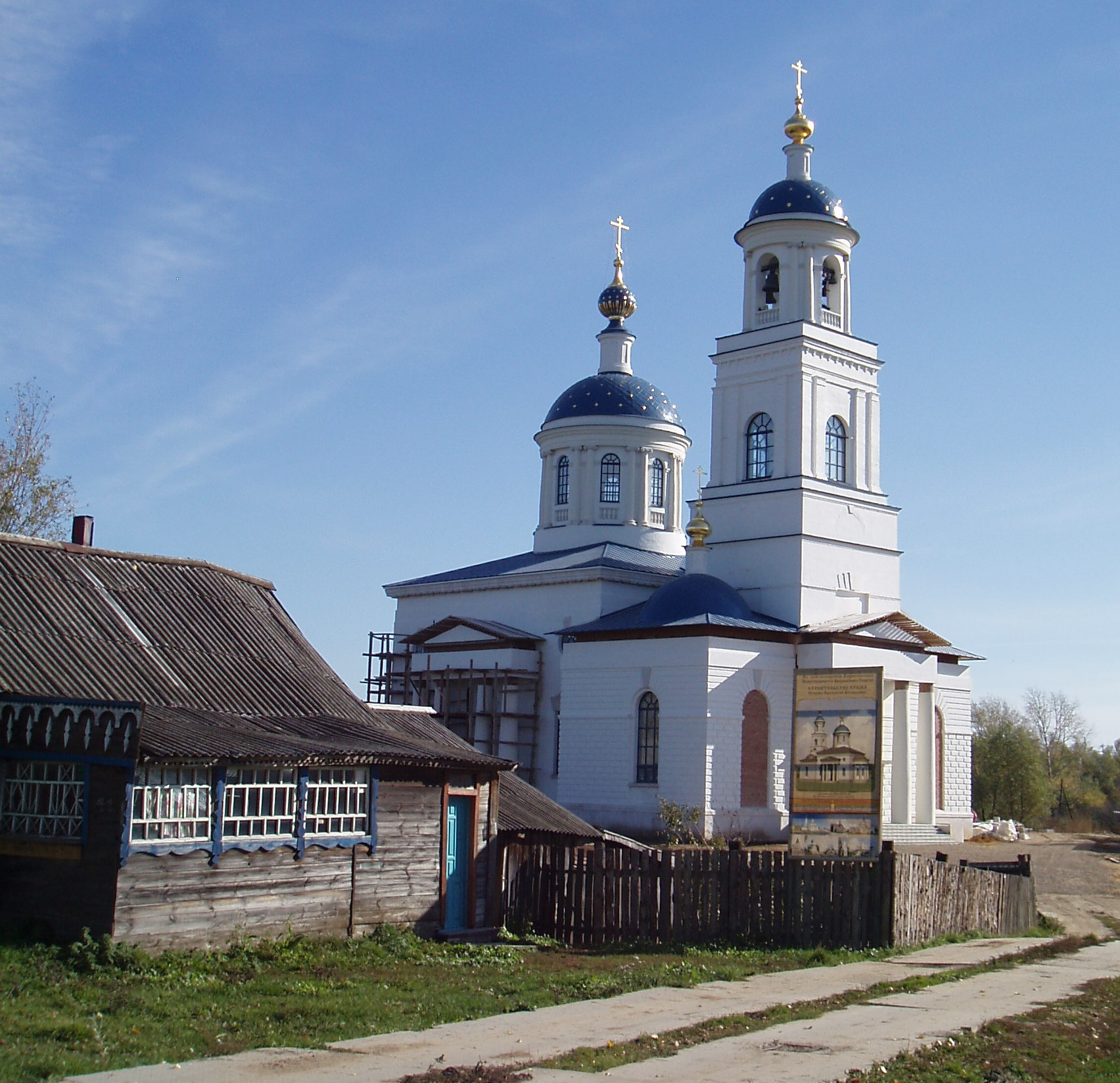 Восстановленная церковь в селе Глухово Дивеевского района Нижегородской области